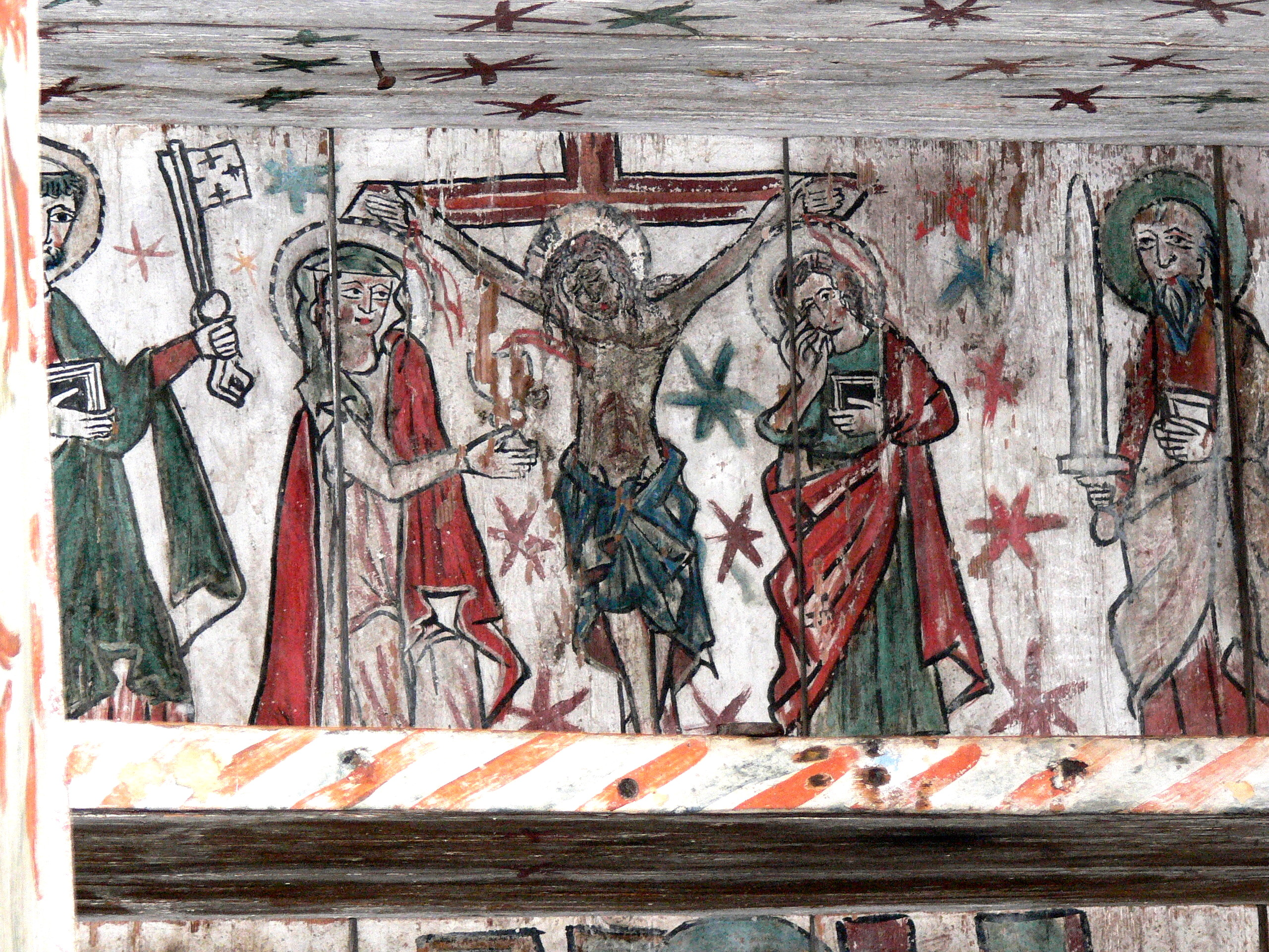 Ekeby kyrka auf Gotland. Gotischer Sakramentsschrank mit Ausmalung - Kreuzigung